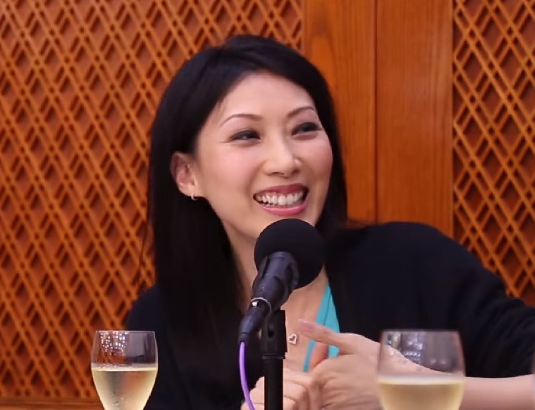 中文（香港）: 香港女性司儀、廣播主持人及作家，曾擔任多個大型籌款節目主持